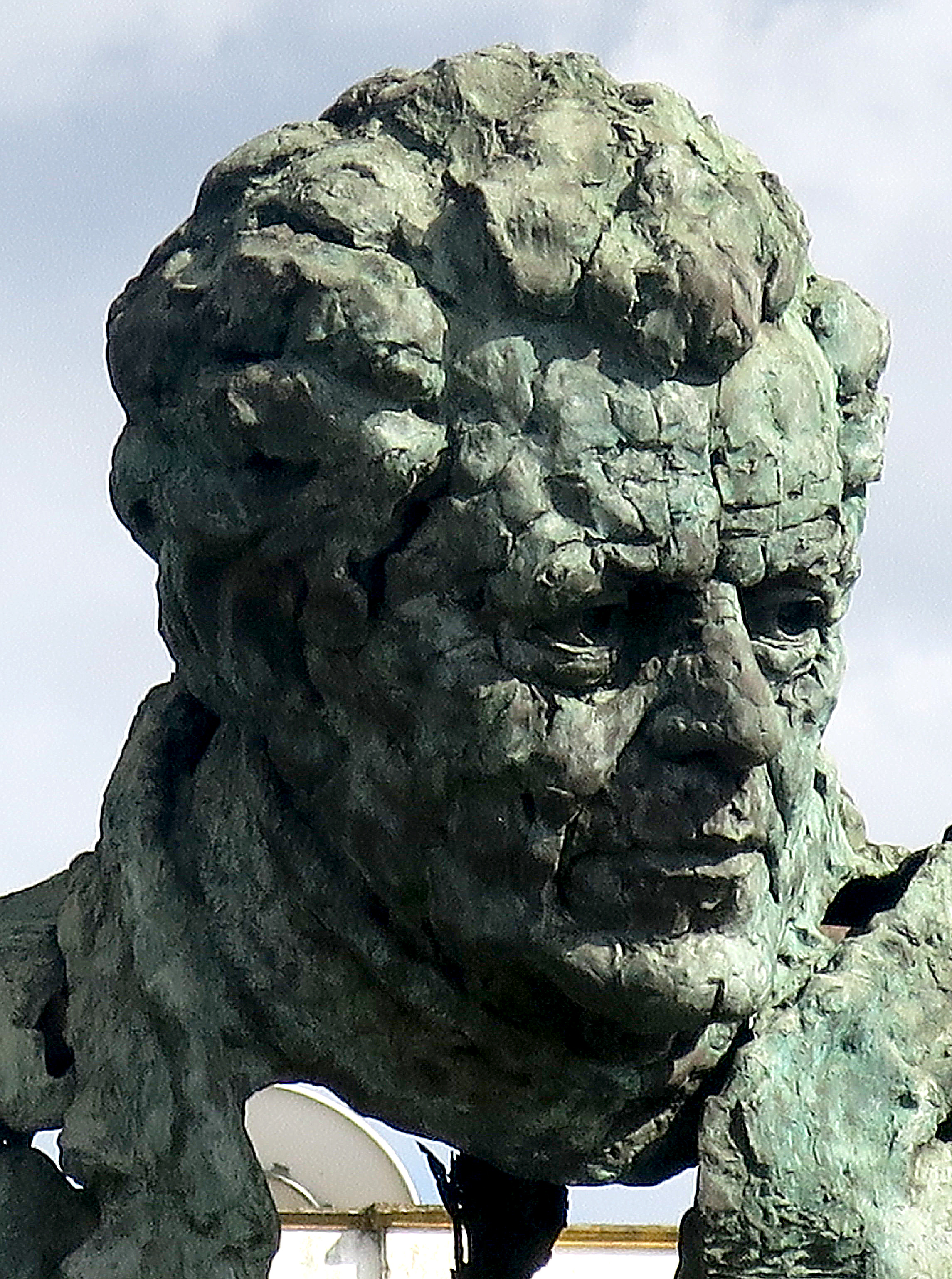 Luis Martínez Giraldo. Monumento a los tres poetas, inaugurado el 12 de noviembre de 2003. Badajoz. Manuel Pacheco.